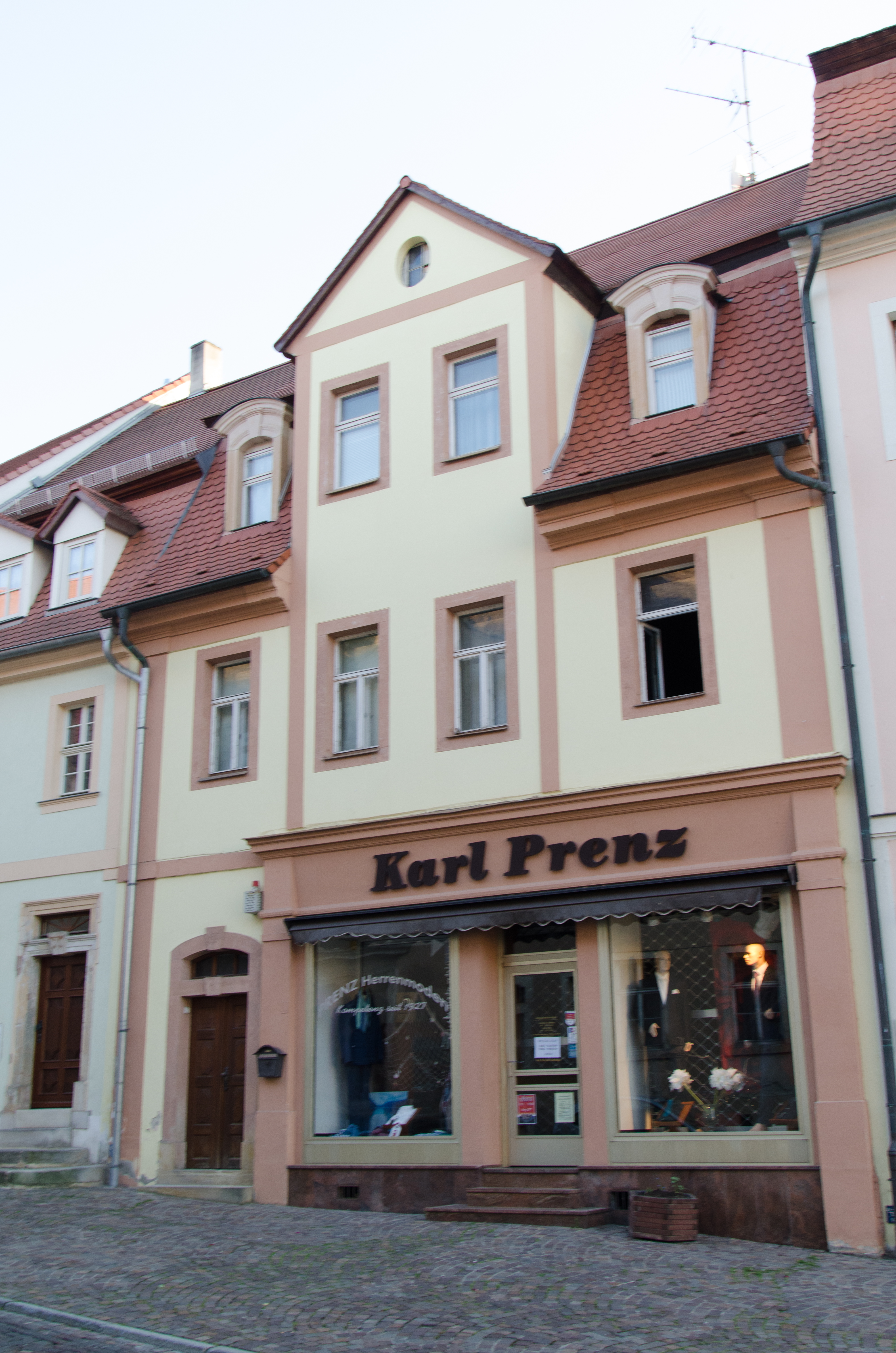 Querfurt, Nebraer Straße 6